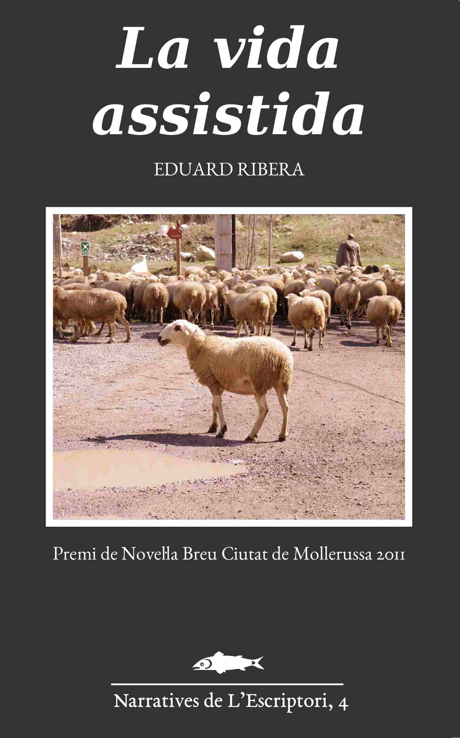 Coberta del llibre "La vida assistida" (2012) d'Eduard Ribera